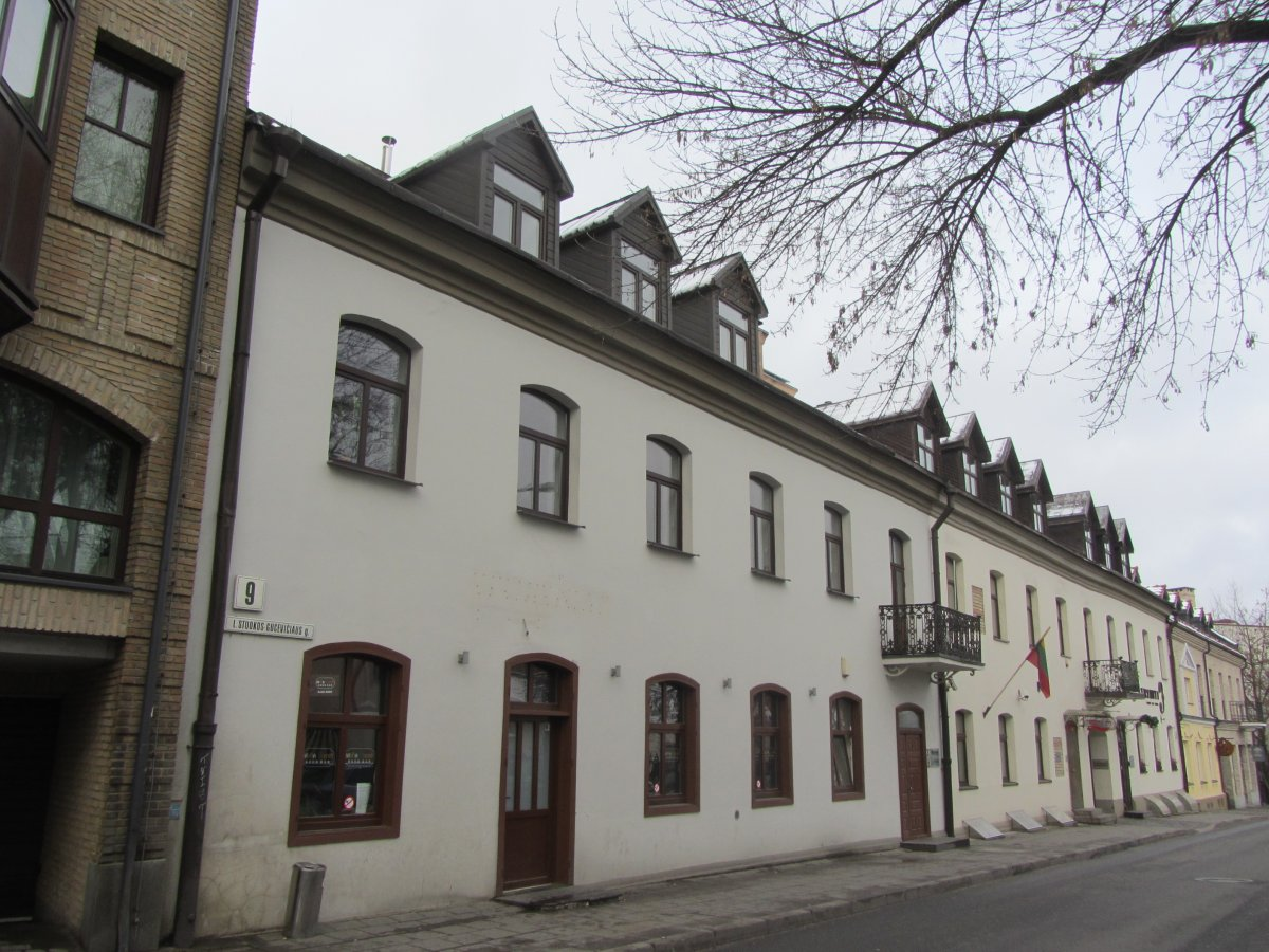 Вільня (Вільнюс). L. Stuokos-Gucevičiaus, 9